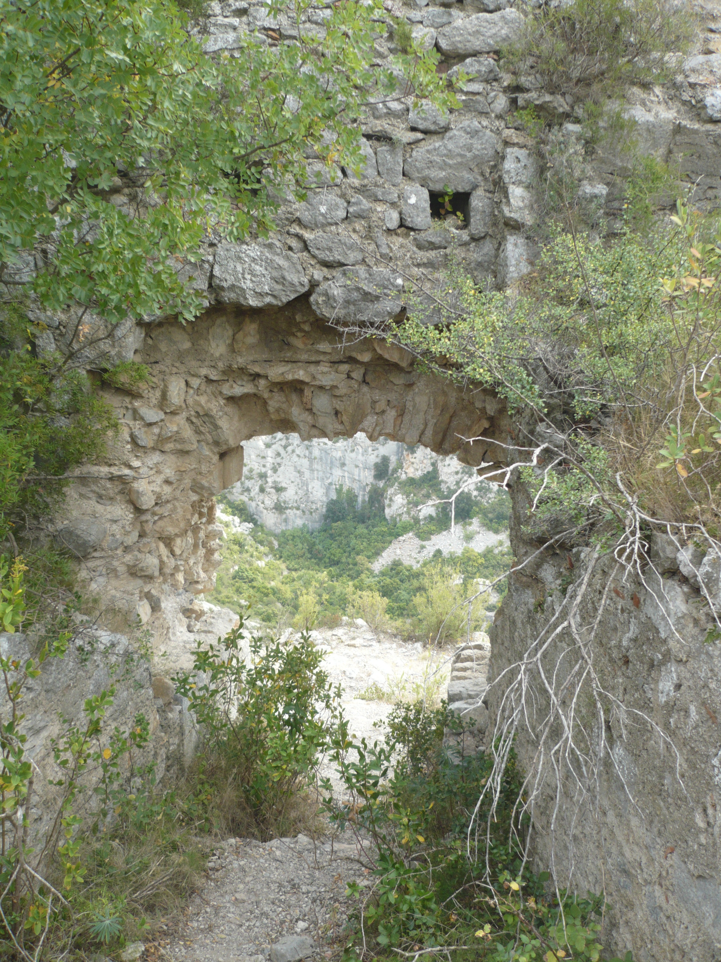 Vue intérieure de la porte du château de Tautavel .